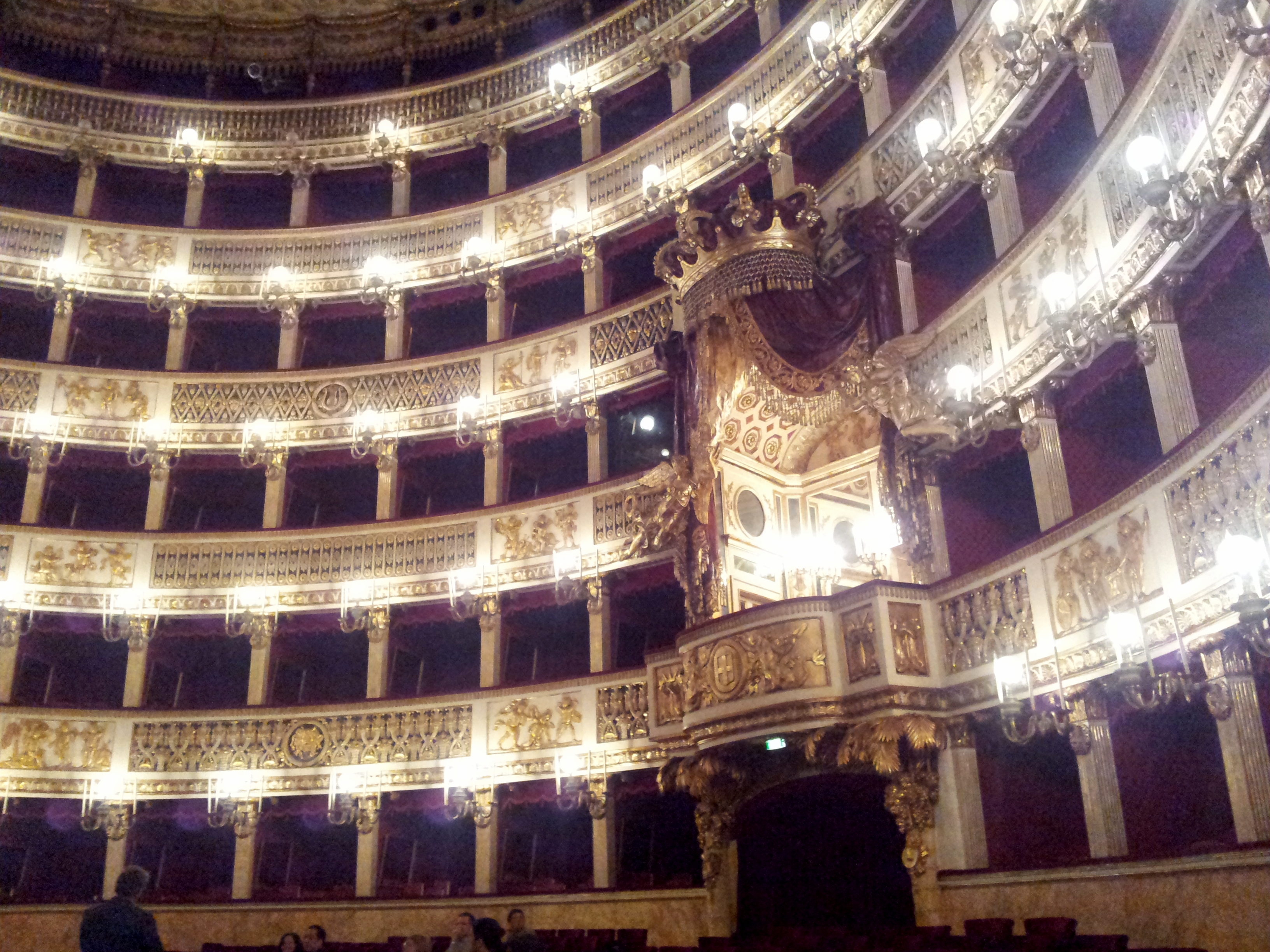 Interno del Real Teatro di San Carlo di Napoli. Vista verso il palco reale.